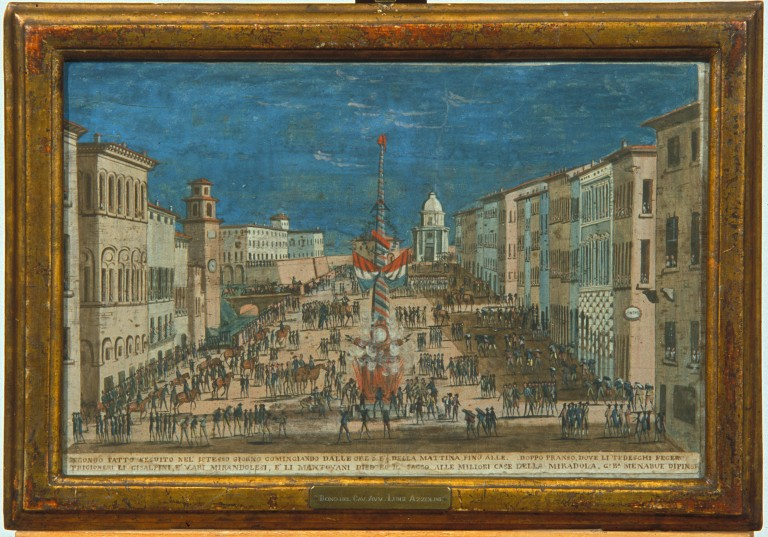 Secondo fatto seguito l'istesso giorno cominciando dalle ore 8 e 1/2 della mattina fino alle. .doppo pranso, dove li tedeschi fecero prigionieri li cisalpini e vari mirandolesi, e li mantovani diedero il sacco alle miliori case della Mirandola. G.° B.° Menabue dipinse.